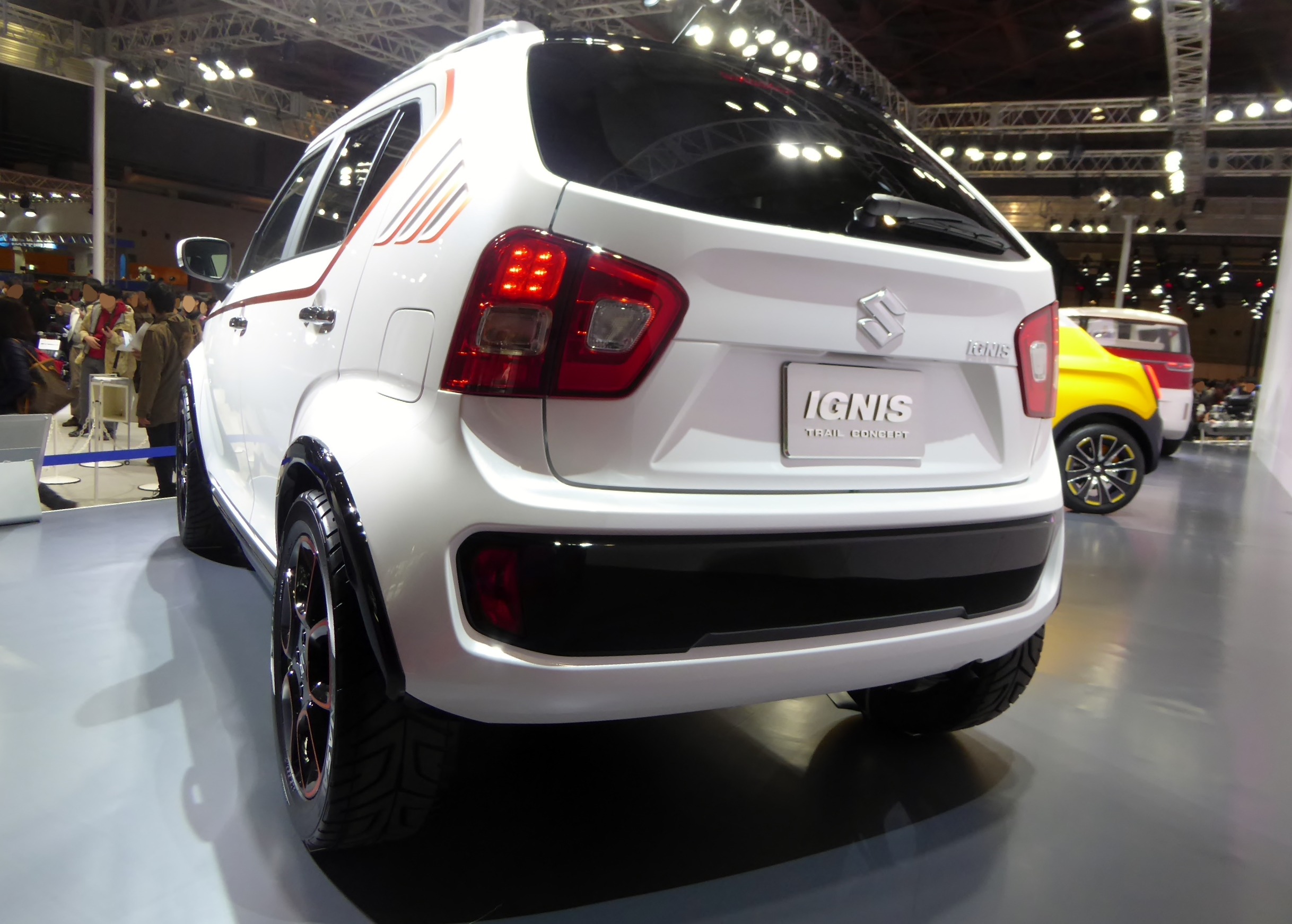 大阪モーターショー2015においてスズキ・イグニストレイルコンセプトを撮影。